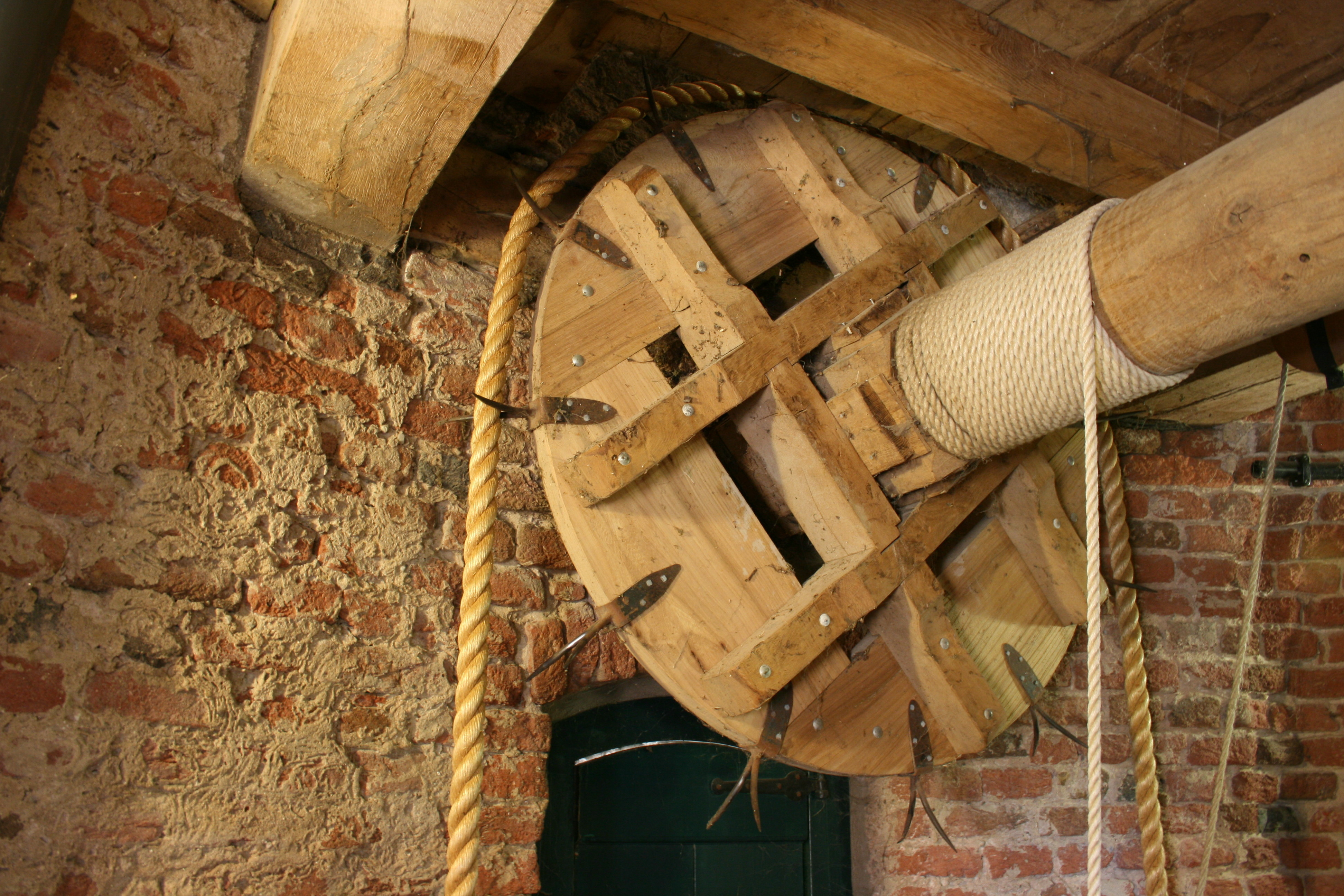 Kalkarer Mühle in Kalkar